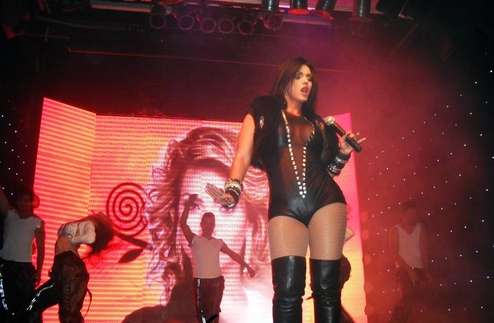 Show da cantora Kelly Key em 2011.